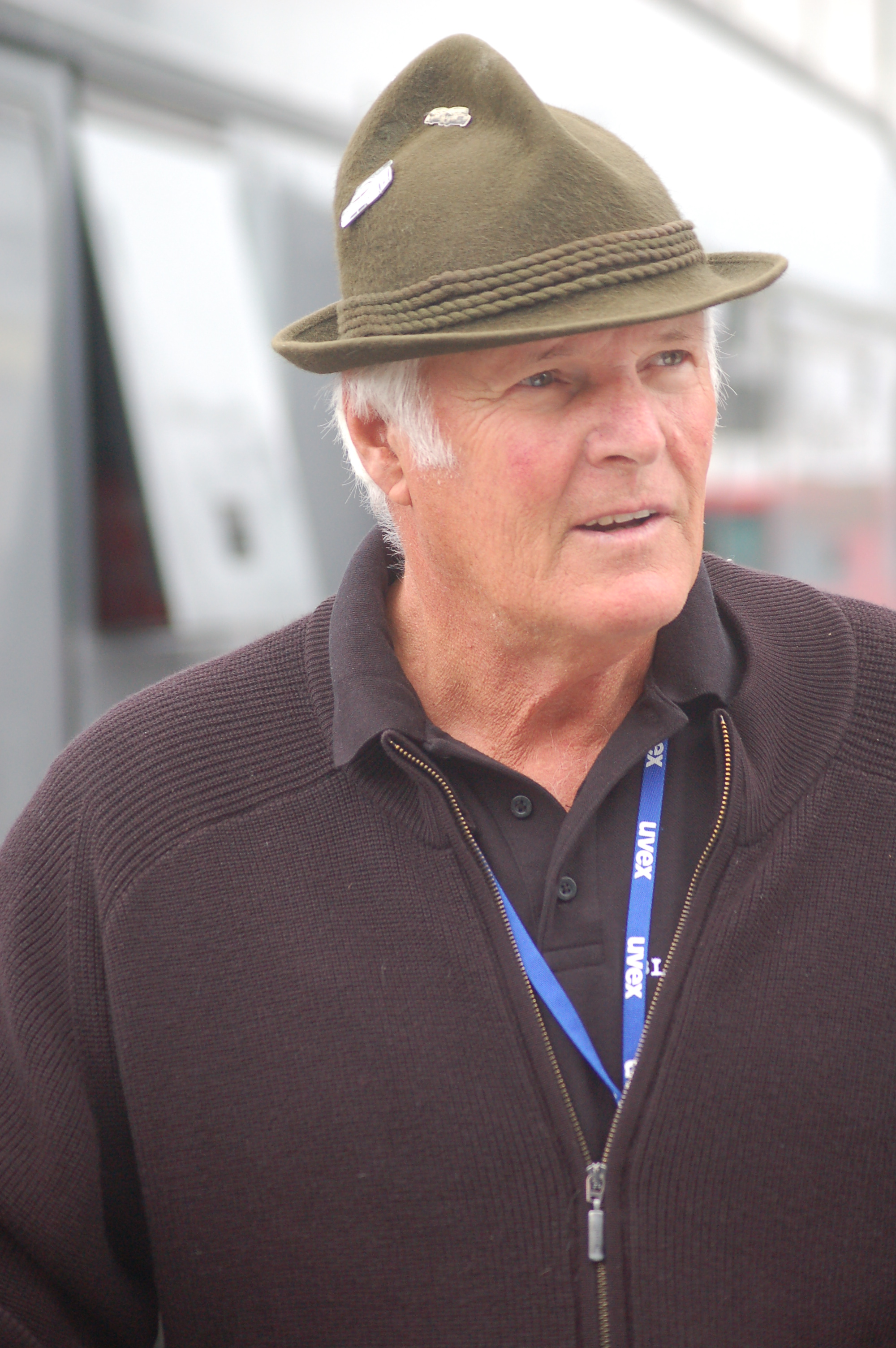 Hans Heyer beim Assen-Wochenende des ADAC GT-Masters